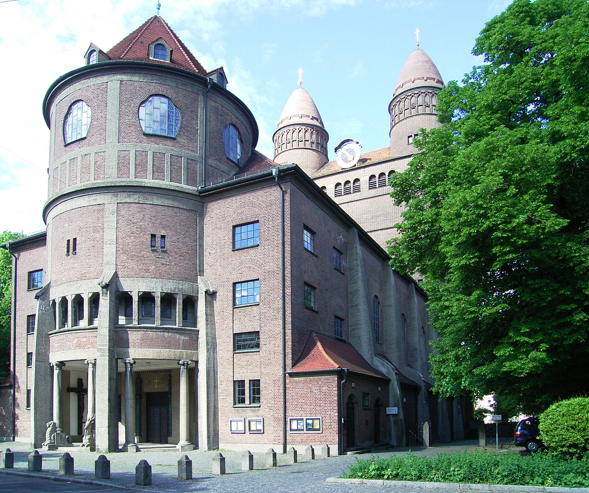 Ulm (Germany), Pauluskirche